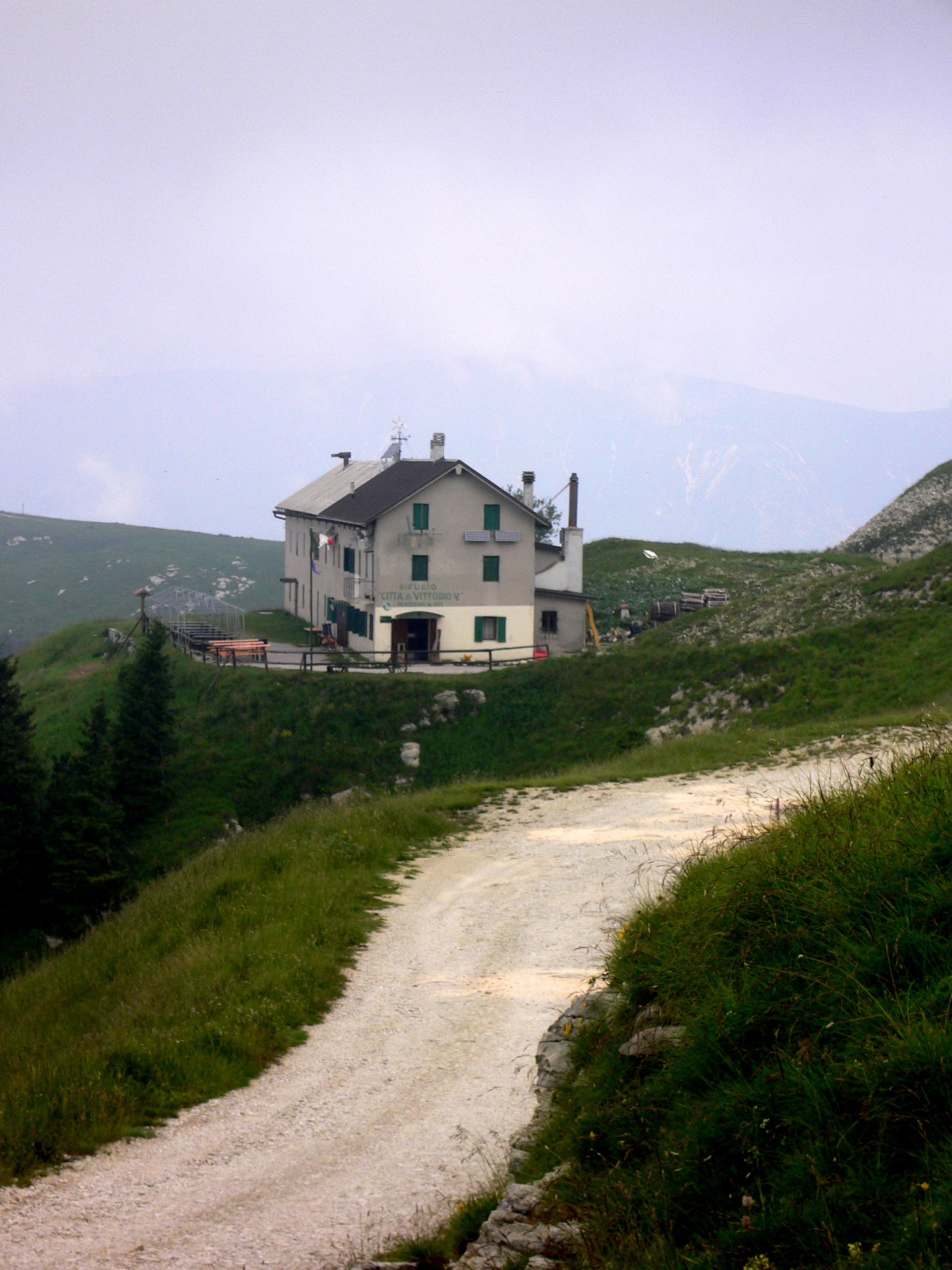 Rifugio Città di Vittorio Veneto al Monte Pizzoc